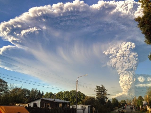 Imagén tomada desde el Sector de Alerce Historico